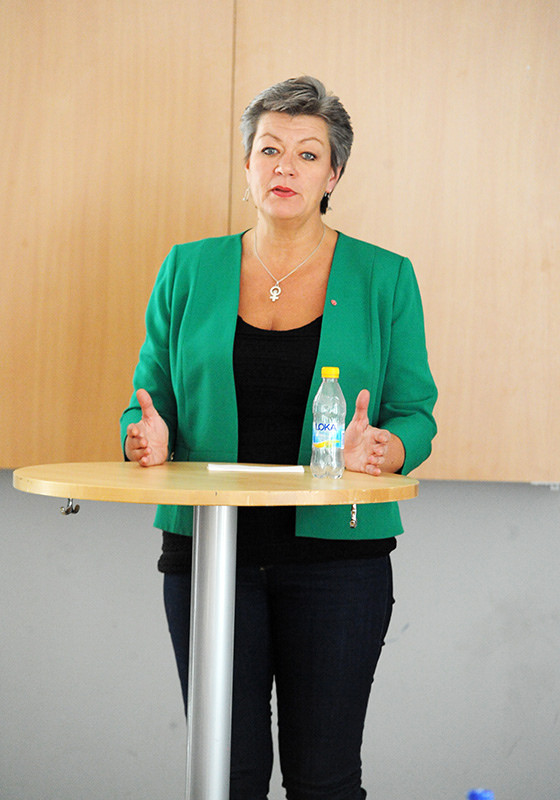 a_25_8890